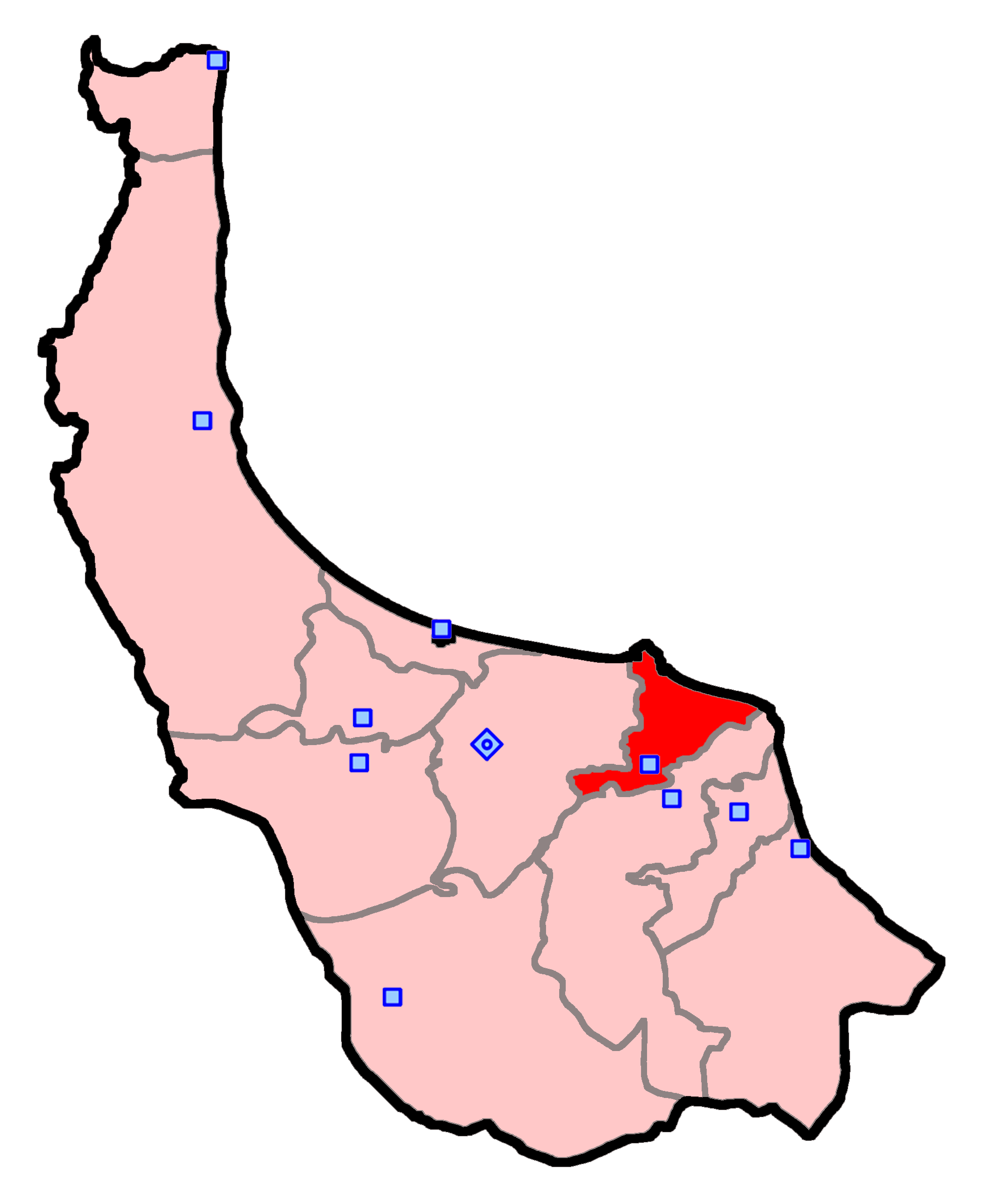 آستانه اشرفیه برای انتخابات مجلس شورای اسلامی